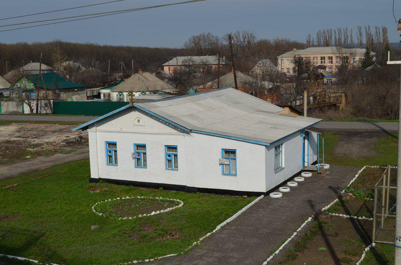 Церковь равноапостольной княгини Ольги. Поселок Горный, Красносулинский район, Ростовская область.